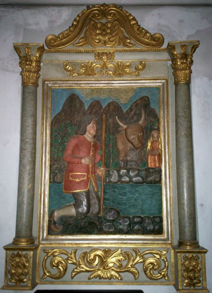 Representacion barròca deu Bueu.